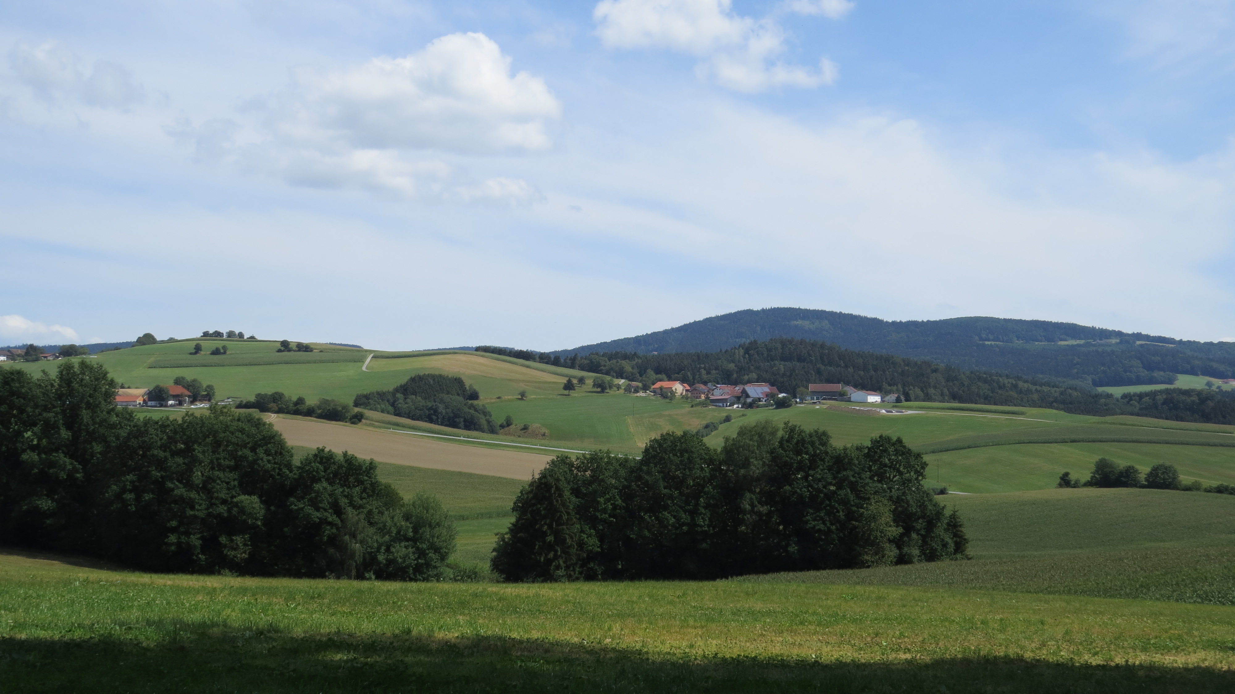 Bei Büchlberg